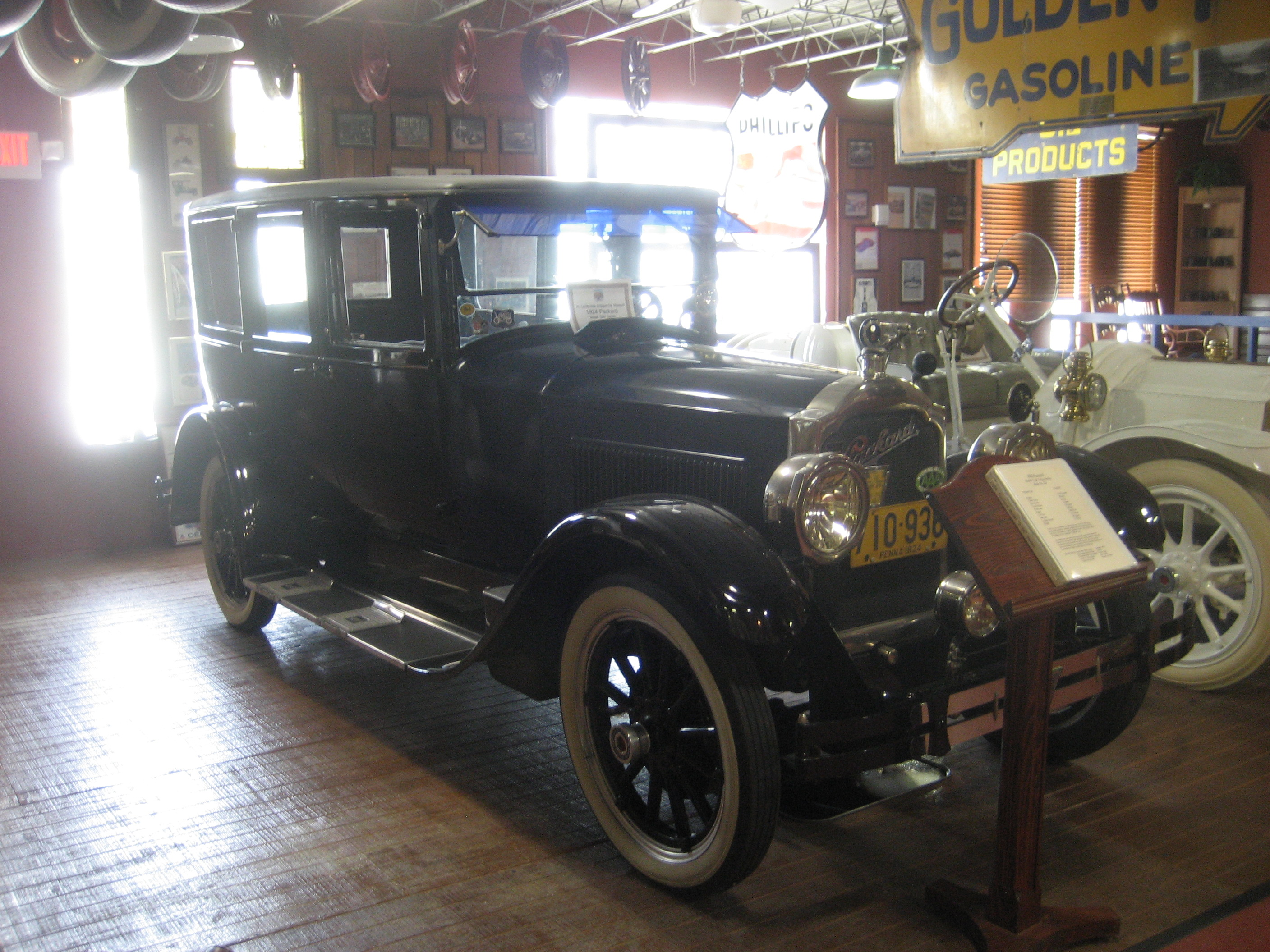 1924 Packard Sedan On display at Fort Lauderdale Antique Car Museum.